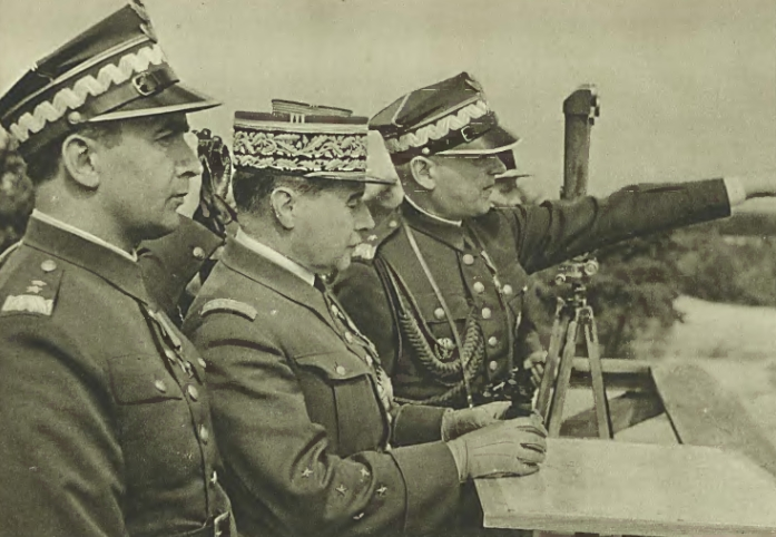 Minister spraw wojskowych generał dywizji Tadeusz Kasprzycki (po lewej) i generał Maurice Gamelin, szef sztabu głównego armii francuskiej (w środku) na manewrach we Francji.